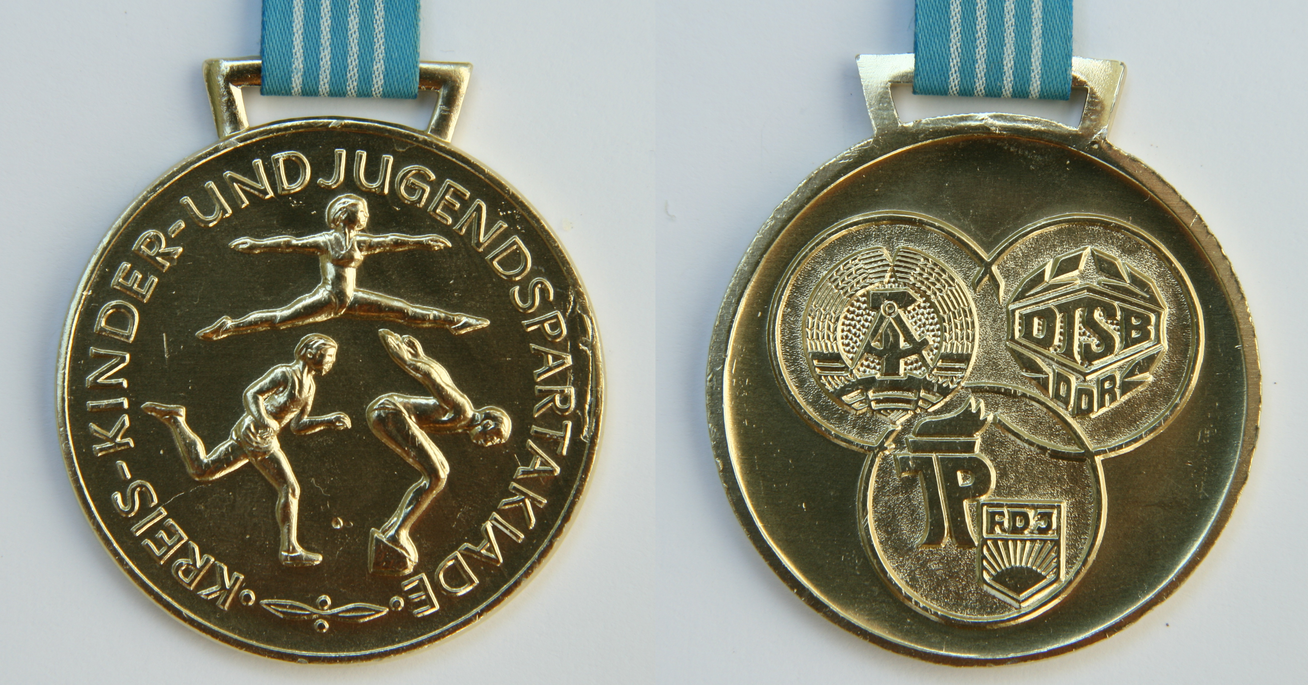 Goldmedaille der Kreis- Kinder und Jugendspartakiade der DDR 1988, beidseitige Abbildung, Durchmesser 50mm